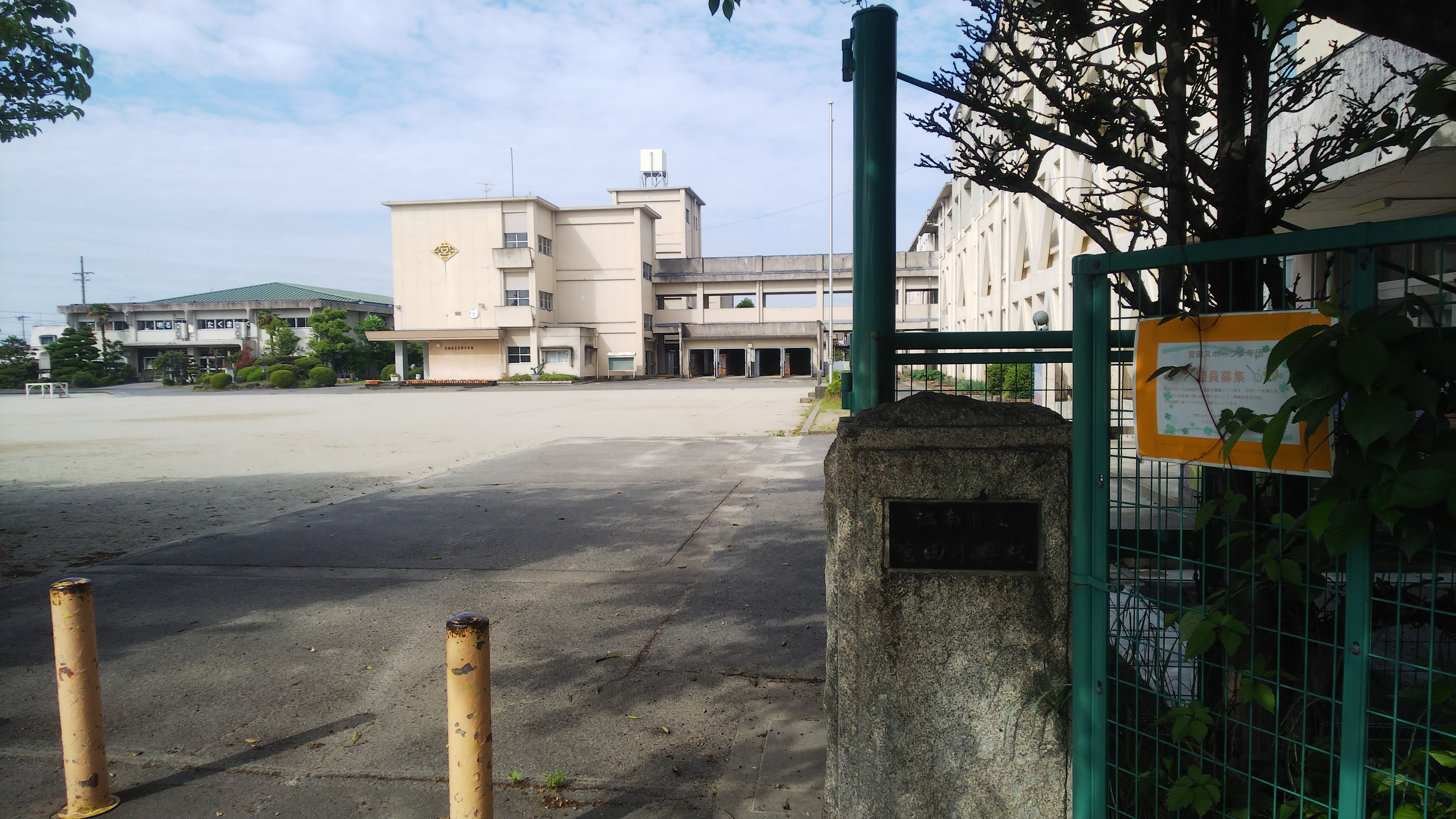 宮田小学校 東から